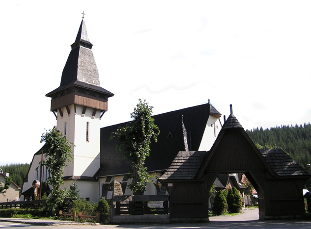 Kostol sv. Anny v Oravskej Lesnej